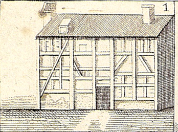 Frauenbad, das spätere Johannisbad; Ausschnitt aus einer Bildtafel aus Franciscus Blondel: Thermarum Aquisgranensium et Porcetarum elucidatio, & thaumaturgia., 1688